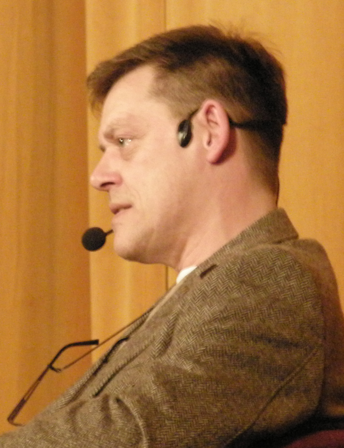 Beseda na téma Barbarství vs. humanita